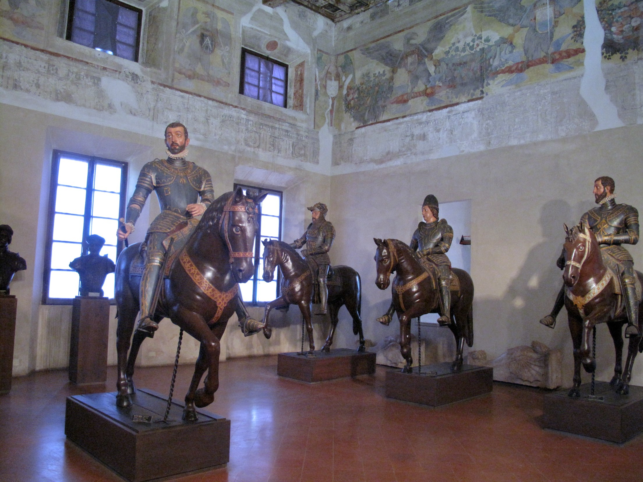 visite juillet 2010